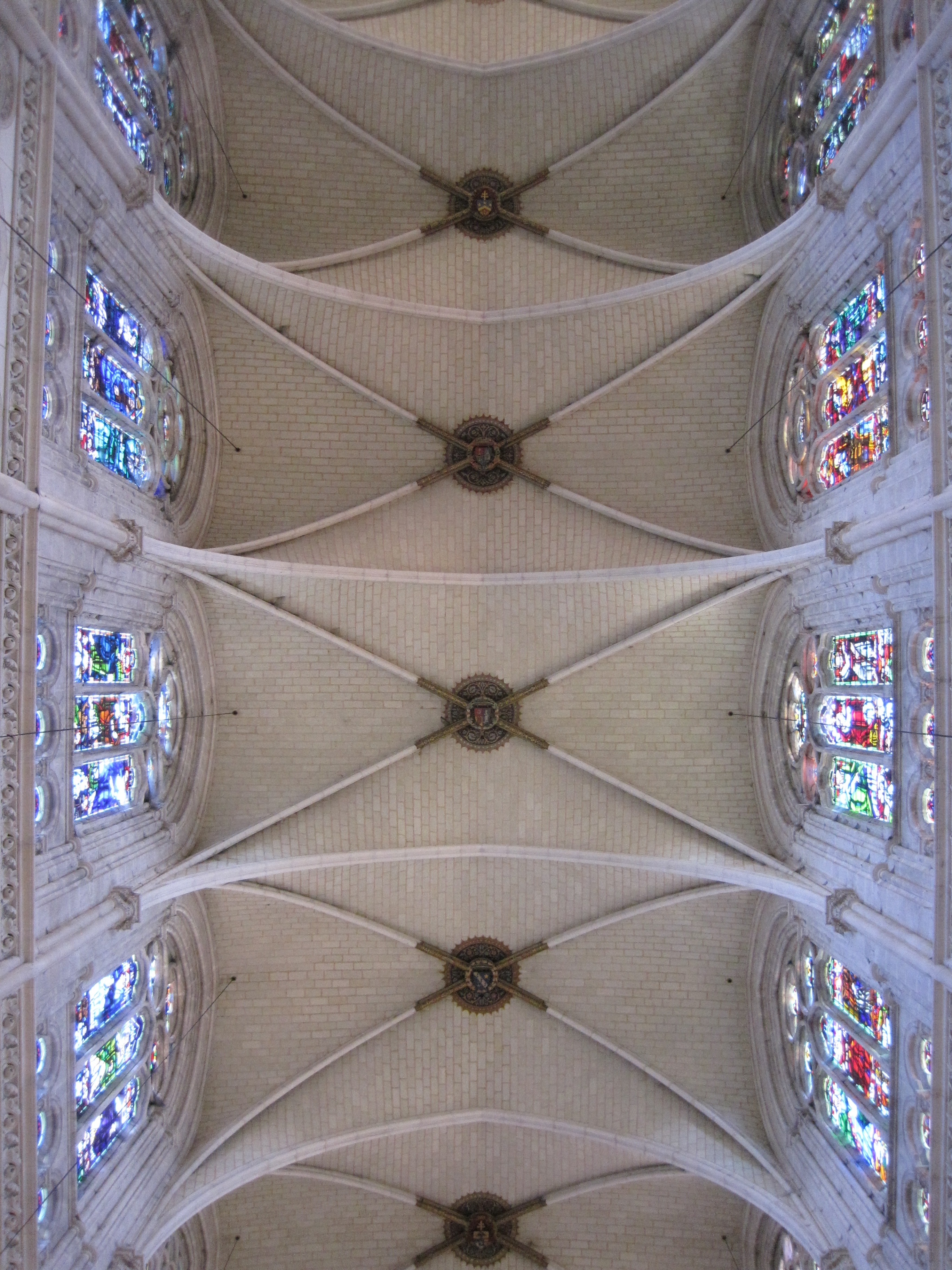 Voûte de la basilique de la Chapelle-Montligeon, dans l'Orne.